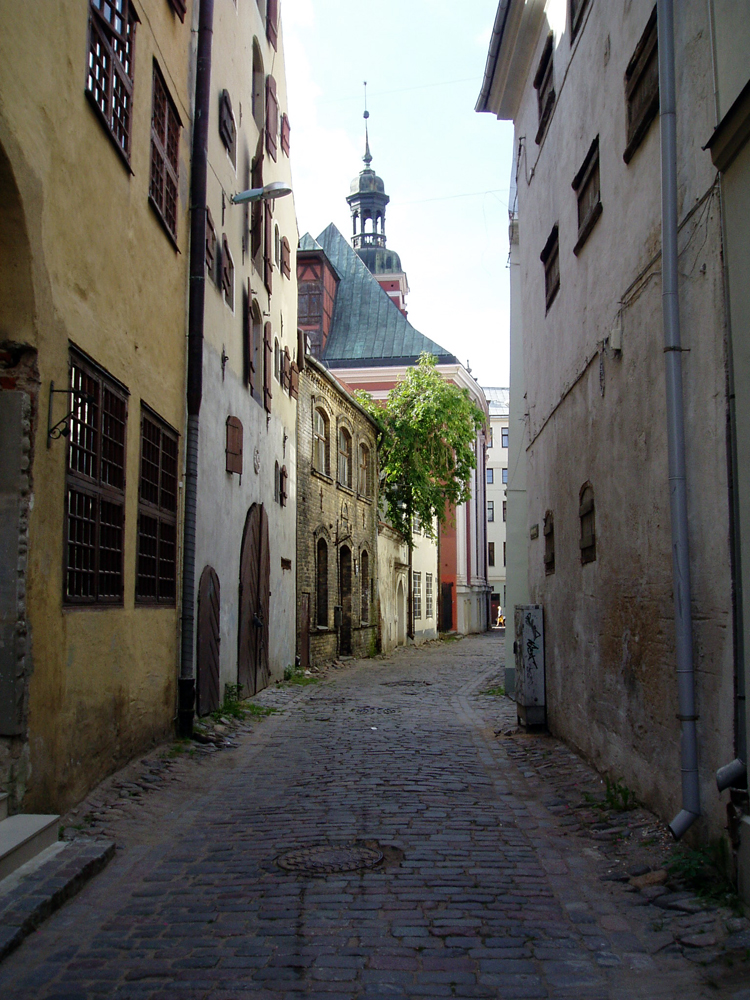 Улица Алксная в Старой Риге